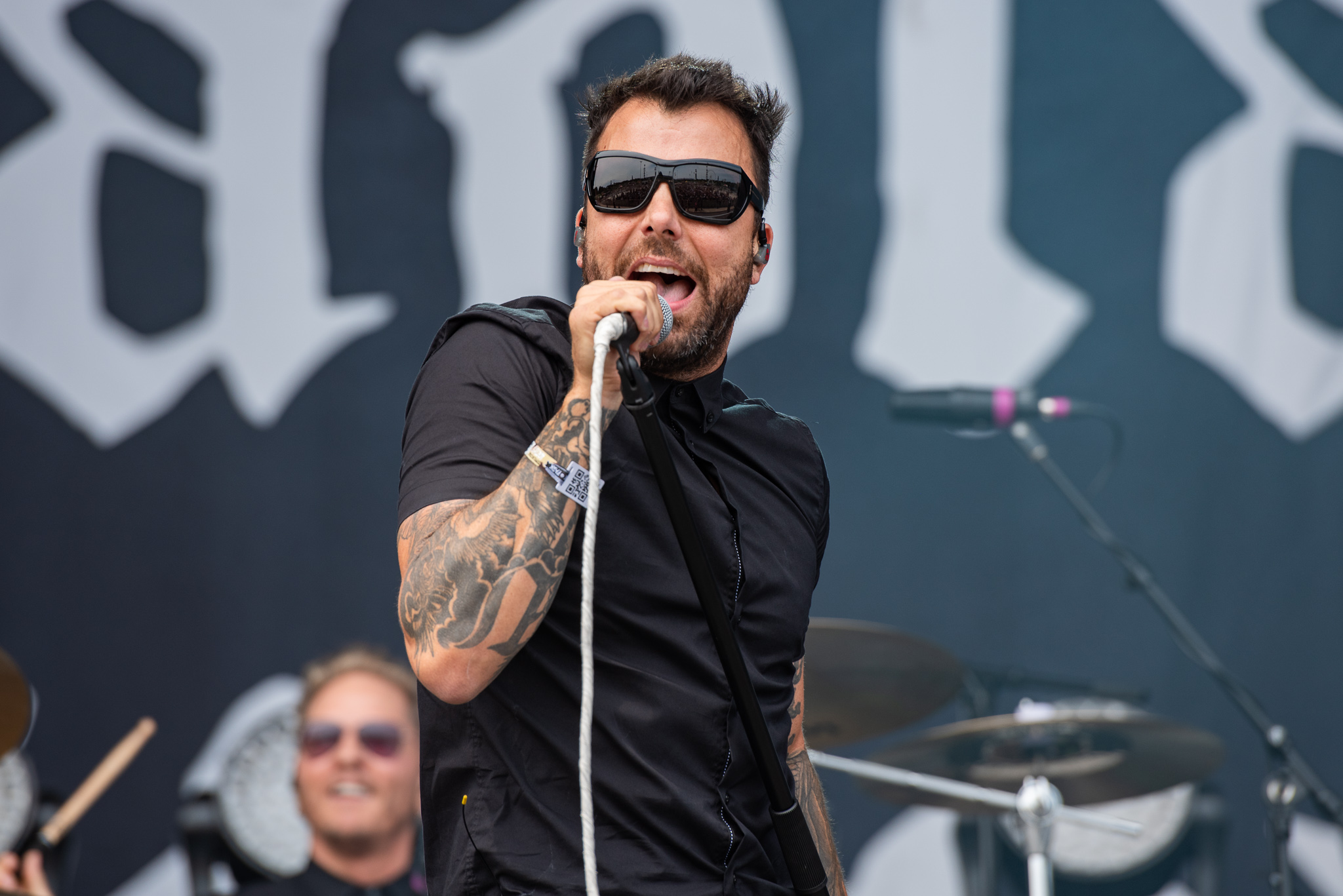 ARGO-Konzerte,Deadland Ritual,Franky Perez,Konzert,Livekonzert,Livemusik,Musik,RiP,Rock im Park 2019,Zeppelin Stage